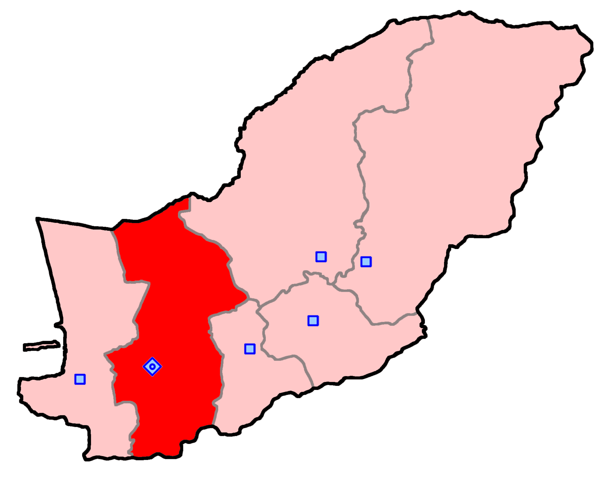 حوزه‌ گرگان برای انتخابات مجلس شورای اسلامی